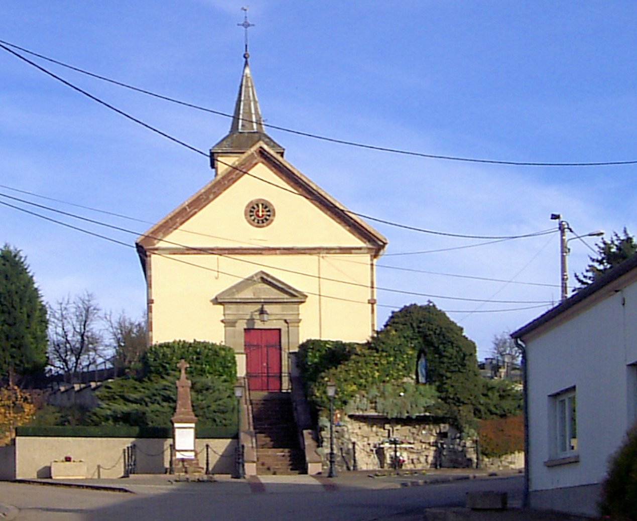 L'église Notre-Dame à Richeling